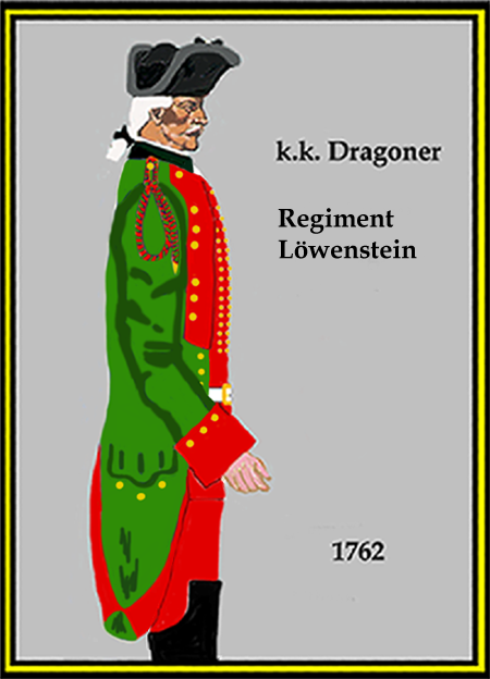 Österreichishes Dragoner-Regiment „Löwenstein“ 1762 (Aus: L.& F. Funcken - „L'Uniforme et les Armes des soldats de la guerre en dentelle II“) Castermann (Tournai 1976)